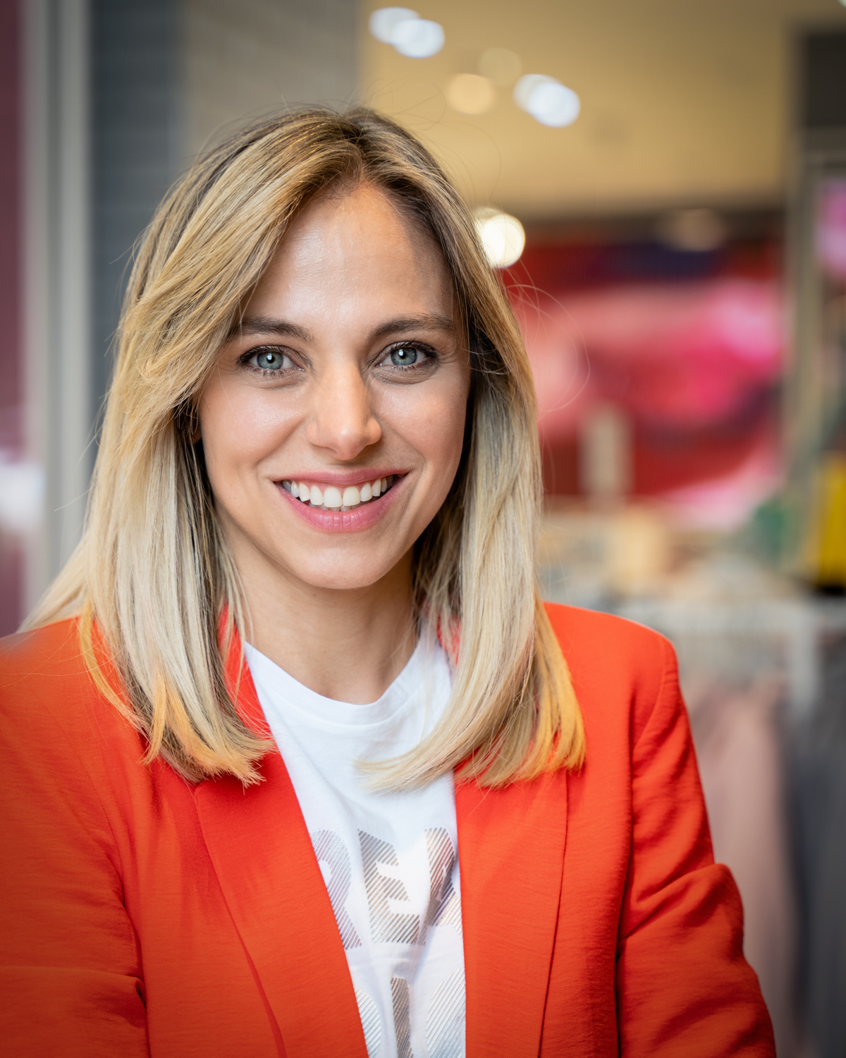 Mariana Dederián en 2018